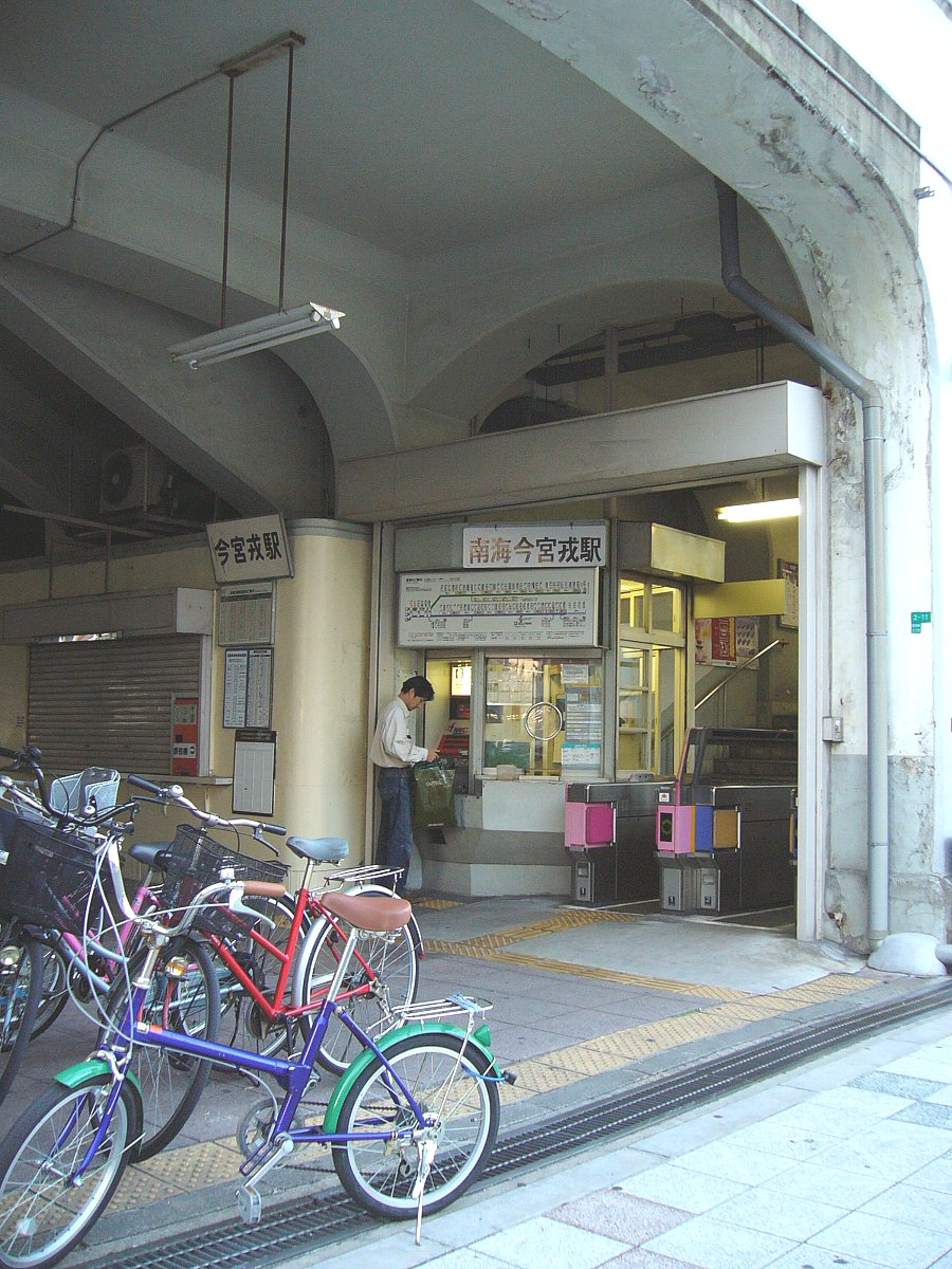 南海今宮戎駅 改札口